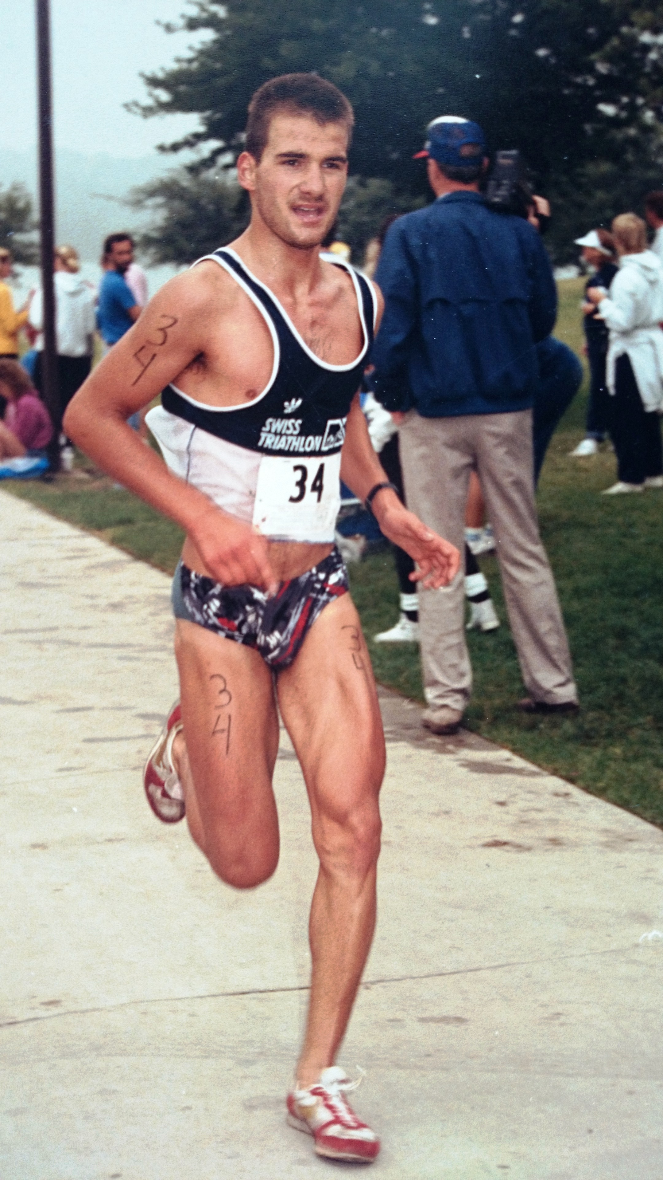 Roy Hinnen bei der USTS Thriathlon Series 1986